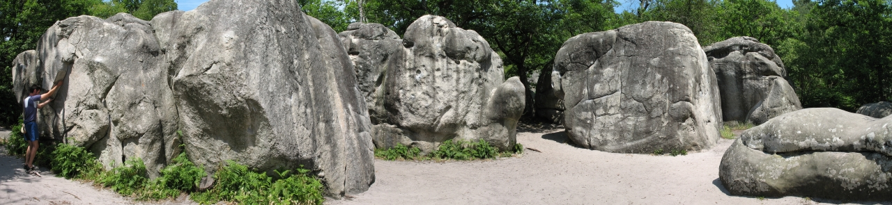 Kletterer am Place du Cuvier im Wald von Fontainebleau.